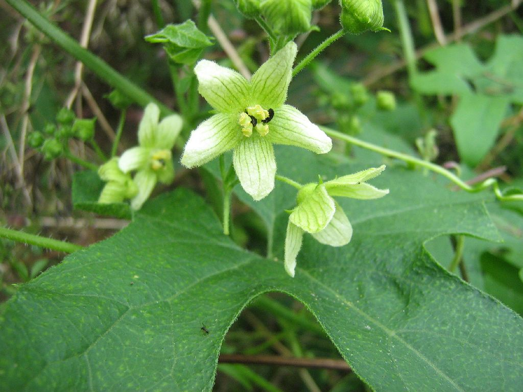 Bryonia dioica